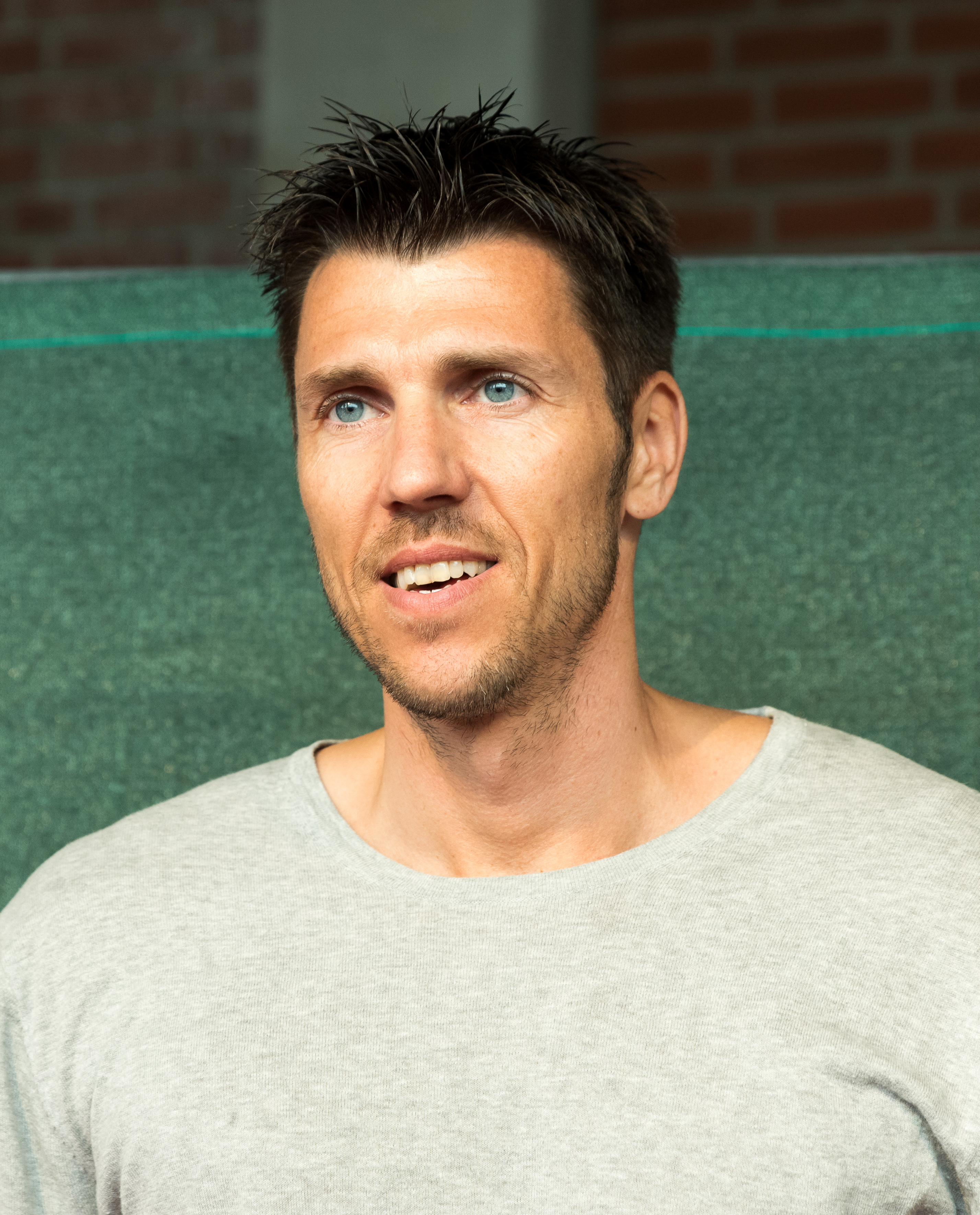 Fabian Boll beim Tag der Legenden 2016